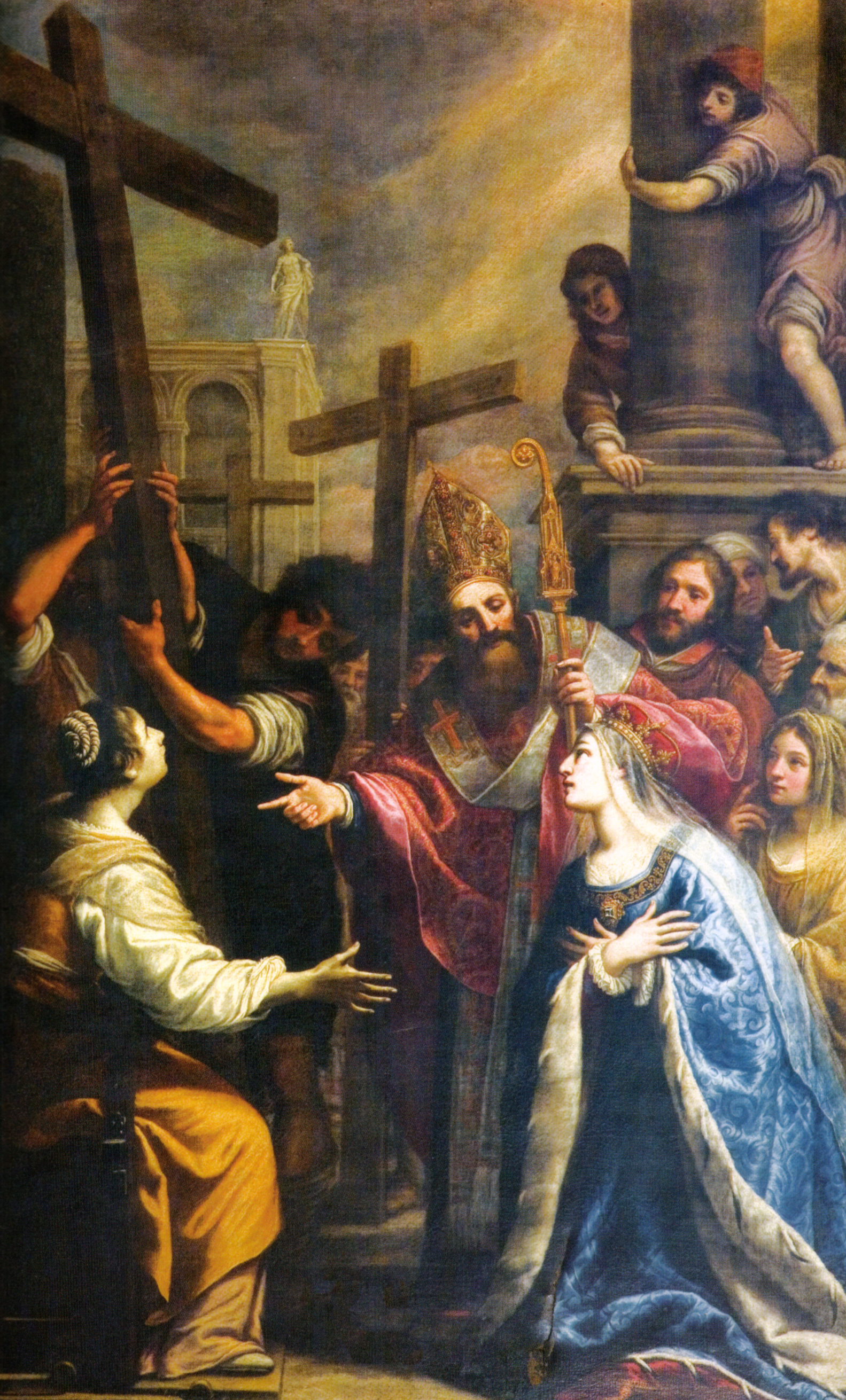 invenzione della santa crocetitle QS:P1476,it:"invenzione della santa croce" label QS:Lit,"invenzione della santa croce"